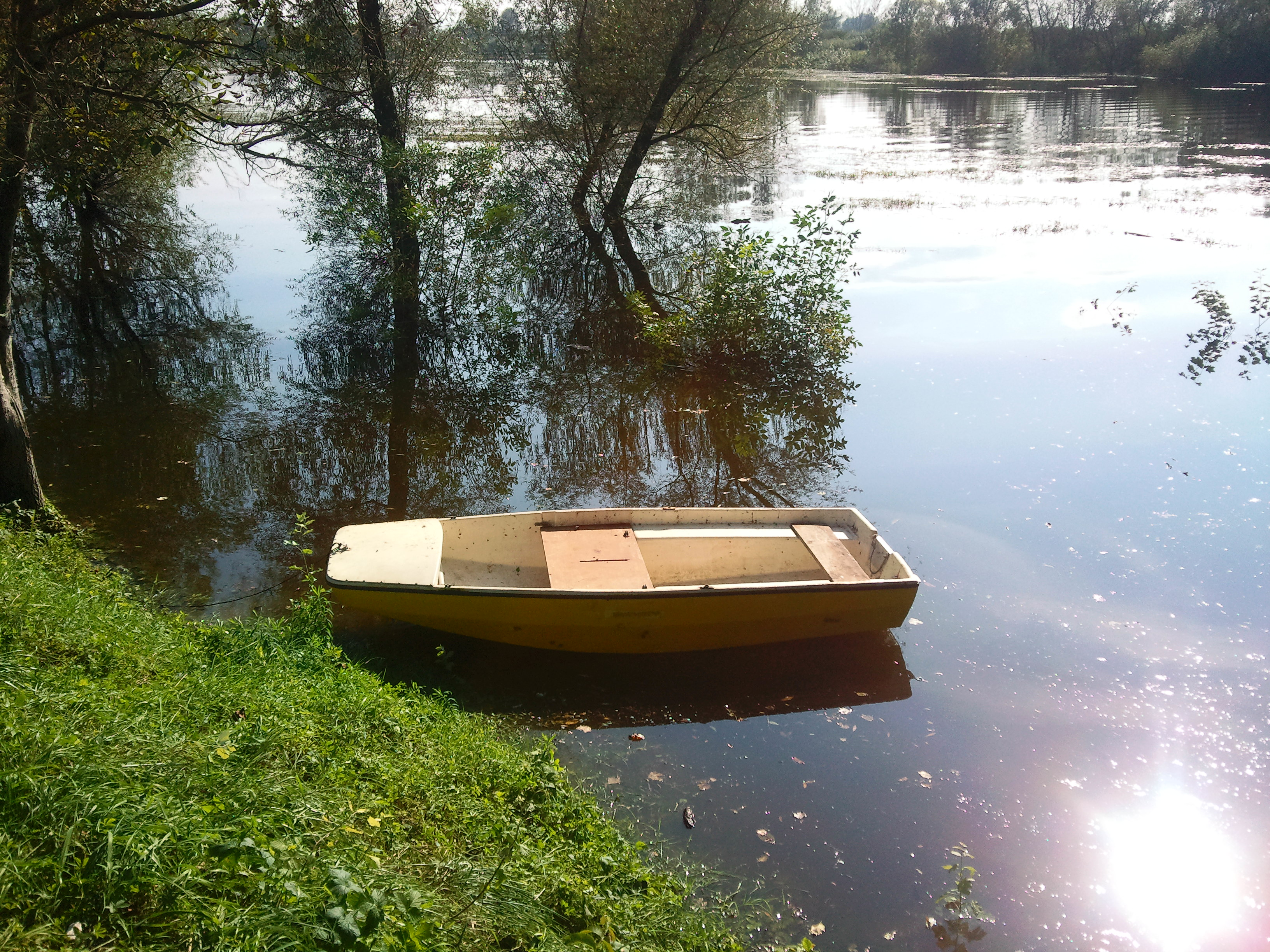 Višnjica, Croatia